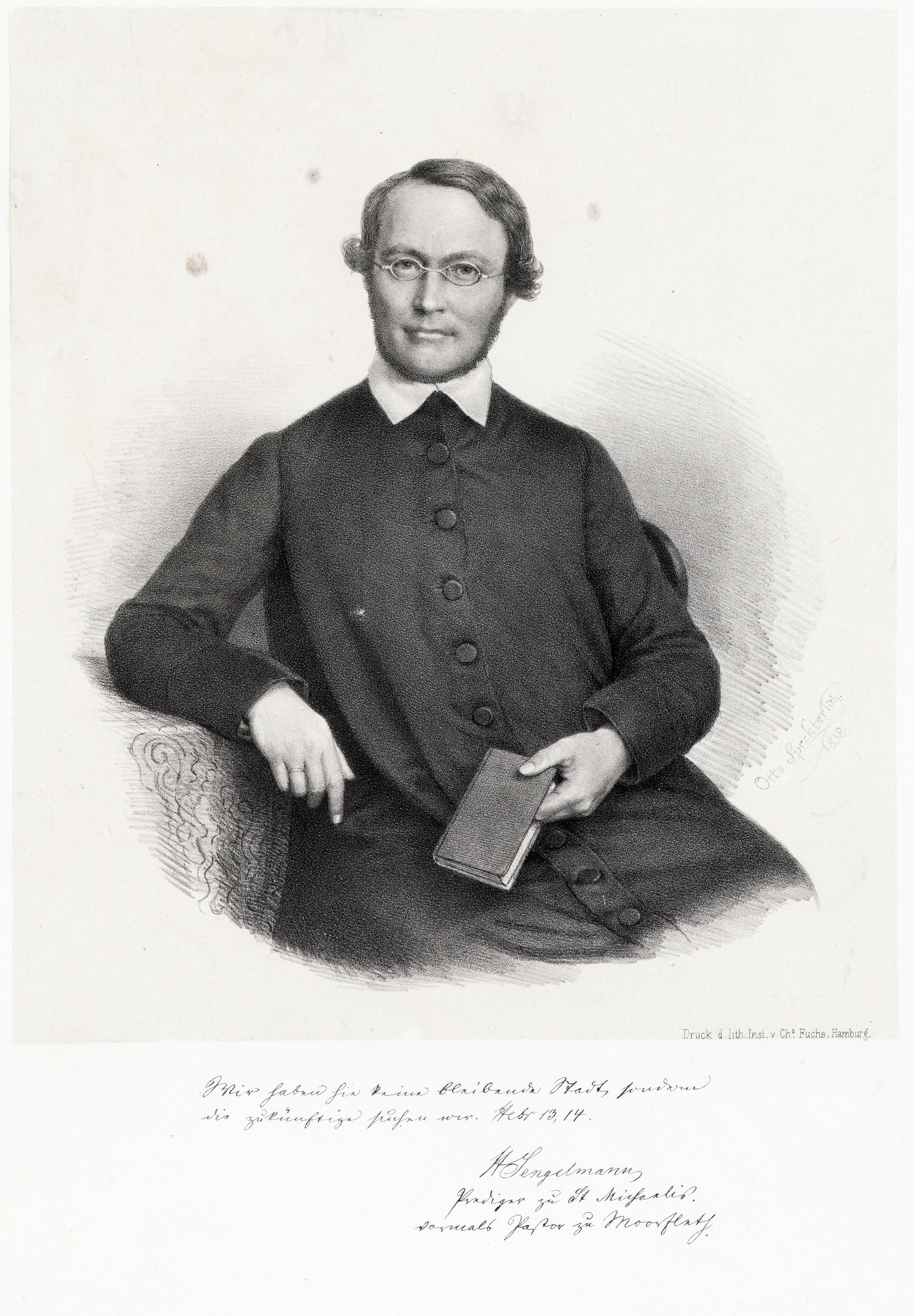 Bildnis von Heinrich Matthias Sengelmann